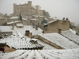 Vu sur le Château de Mirabeau enneigé